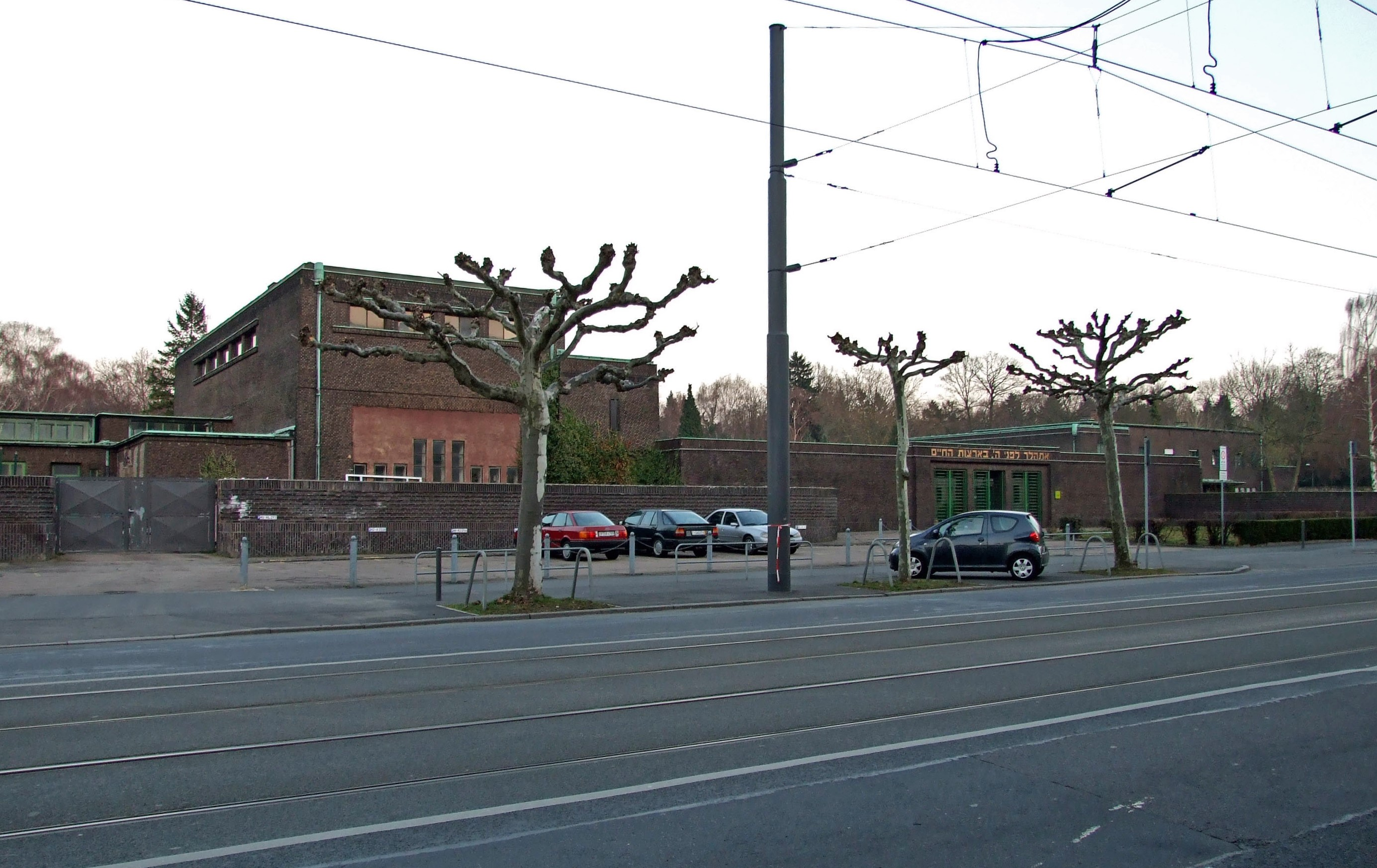 Neues Portal des Juedischen Frankfurter Hauptfriedhofes an der Eckenheimer Landstrasse